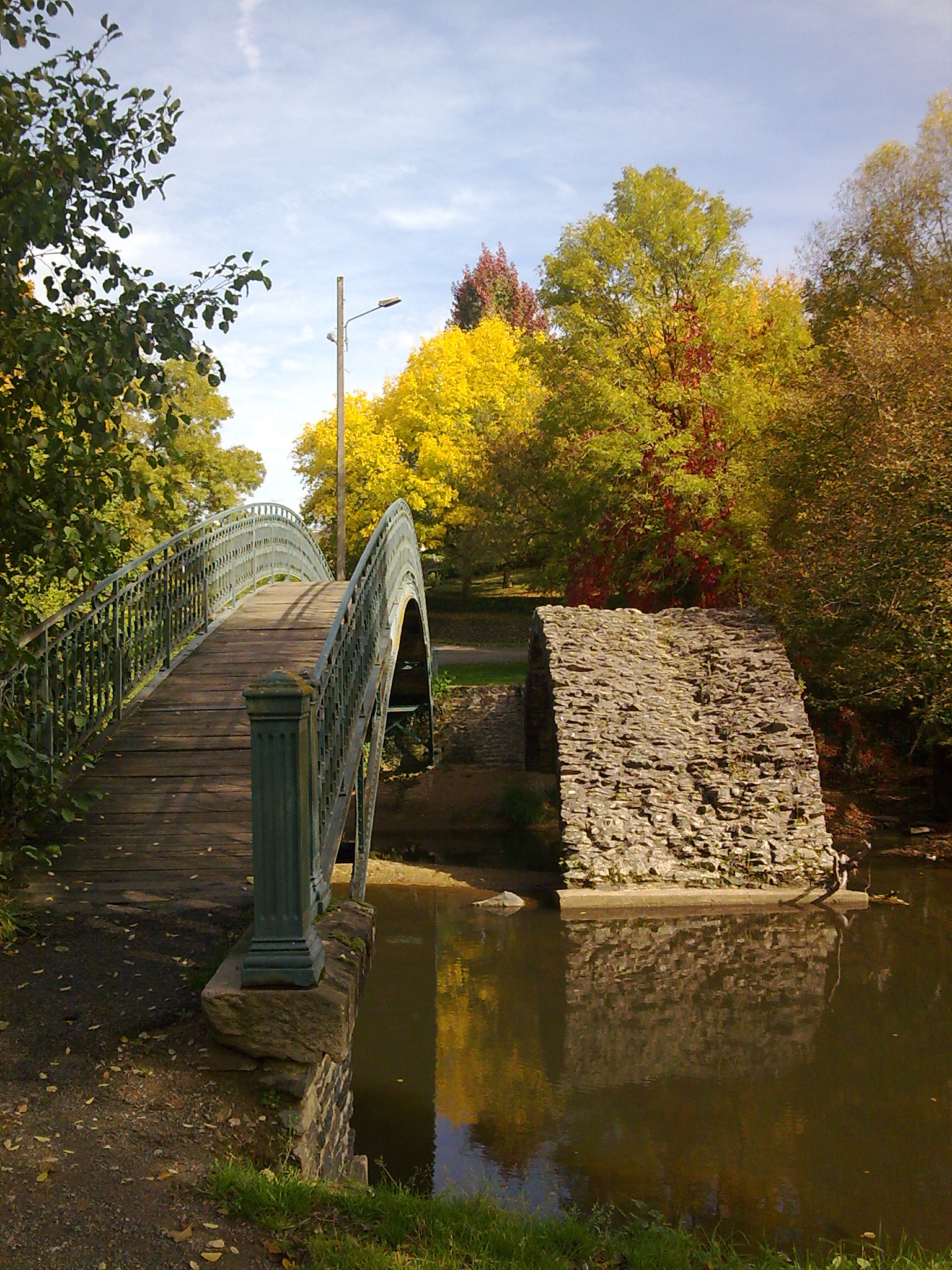 Pont de Malassert (XIVe siècle) dit Pont Romain